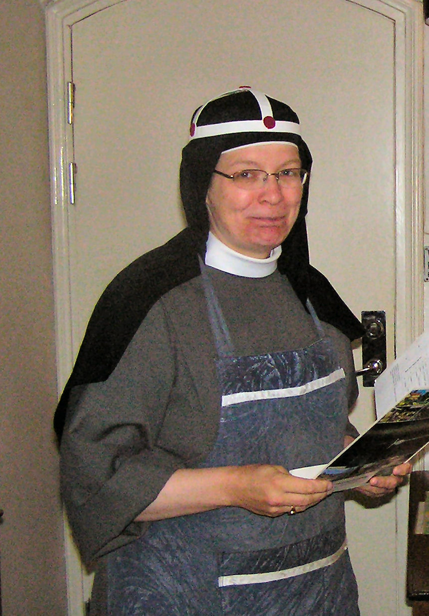 Birgittasister, Vadstena